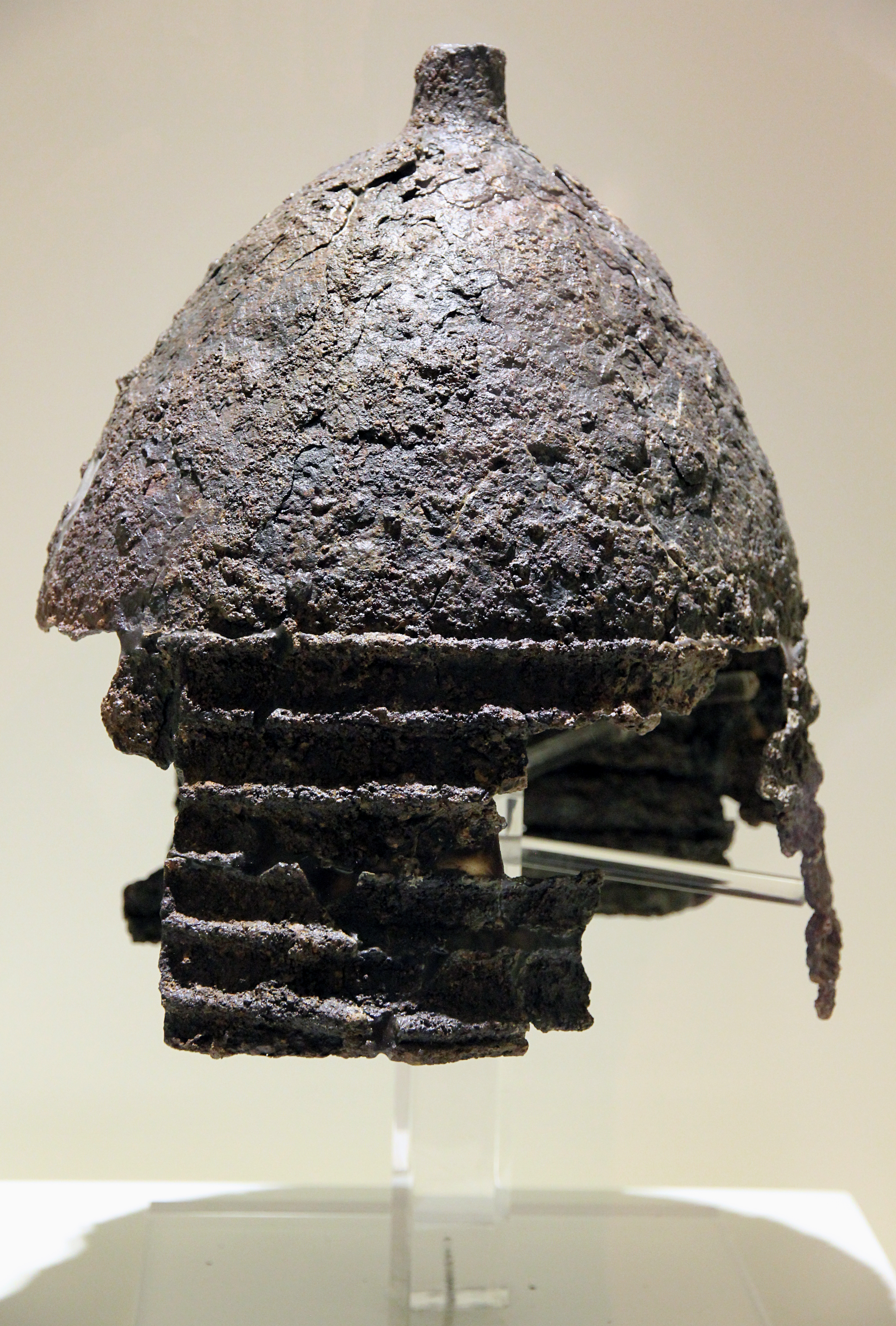 Ḫattuša, Hauptstadt der Hethiter, phrygischer Eisenhelm, 8. bis 7. Jahrhundert v. Chr., vom Nordwesthang, Museum Boğazkale, Zentraltürkei